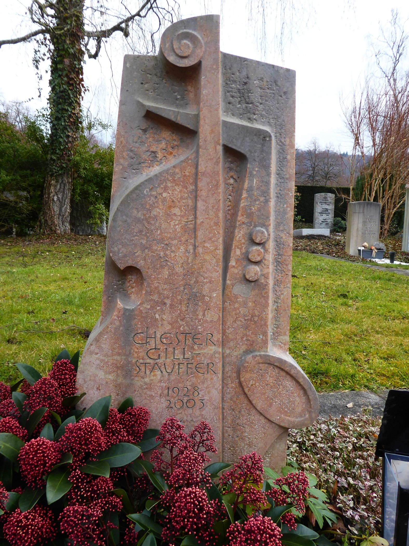 Chester Gill-Stauffer (1928-2003) Jazzmusiker, Komponist, Chorleiter.Grab auf dem Friedhof am Hörnli, Riehen, Schweiz